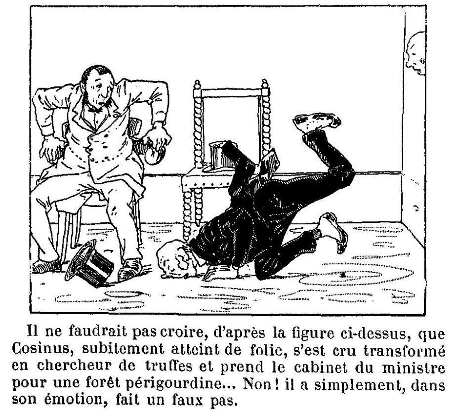 Deuxième case de la page 79 de la bande dessinée L'idée fixe du savant Cosinus.